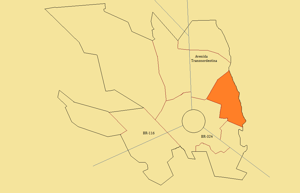 Distrito Jaíba em cor laranja, em Feira de Santana, Bahia, Brasil.